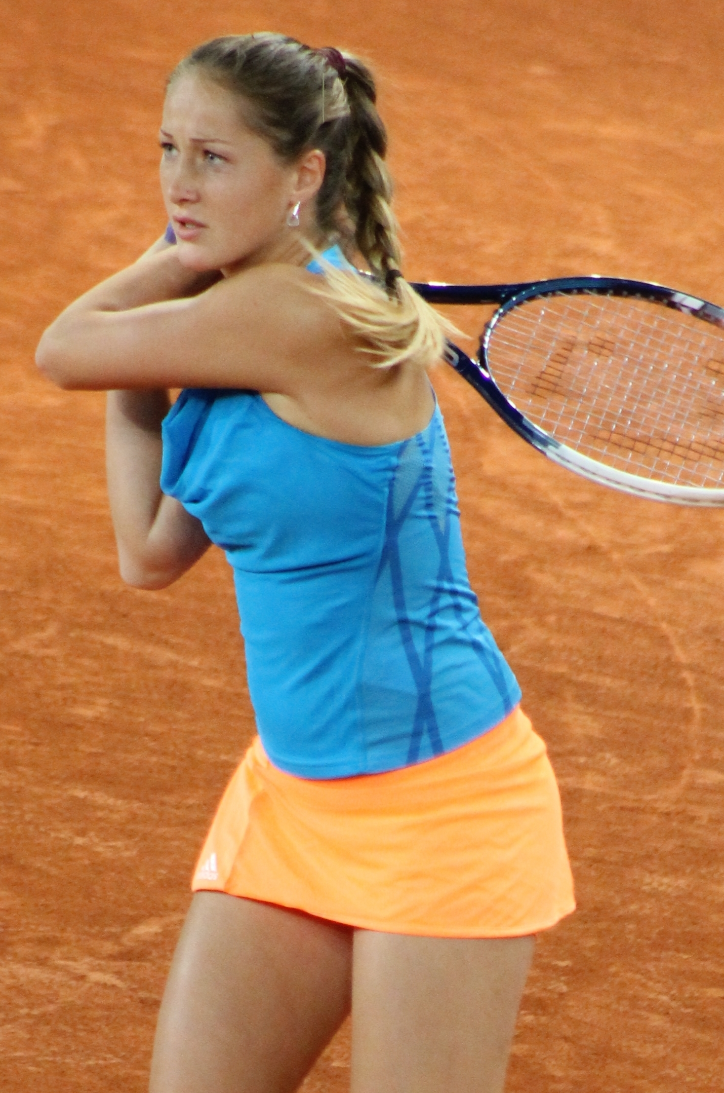 Jovanovski MA14 (5)